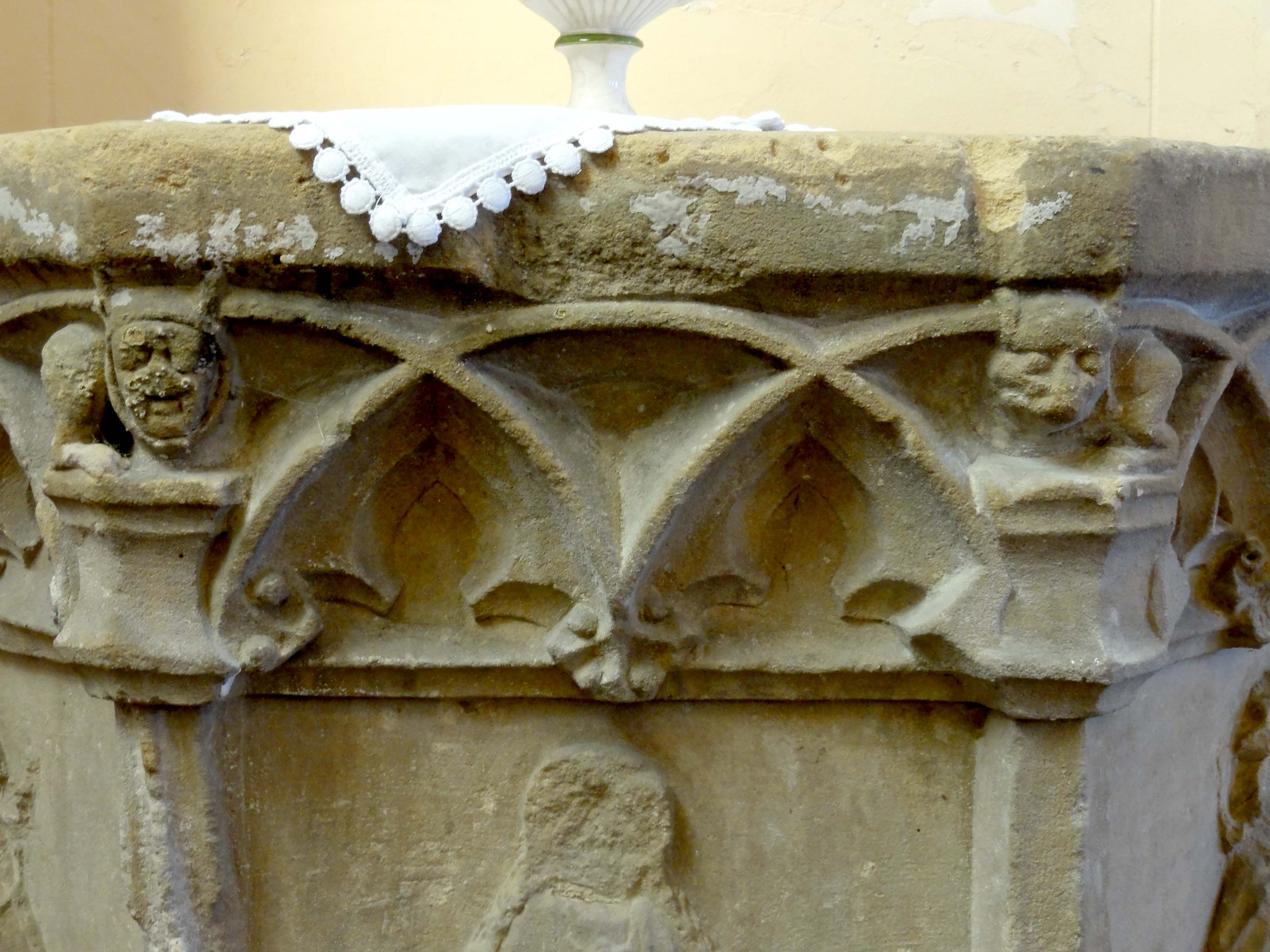 Fonts baptismaux (voir titre).